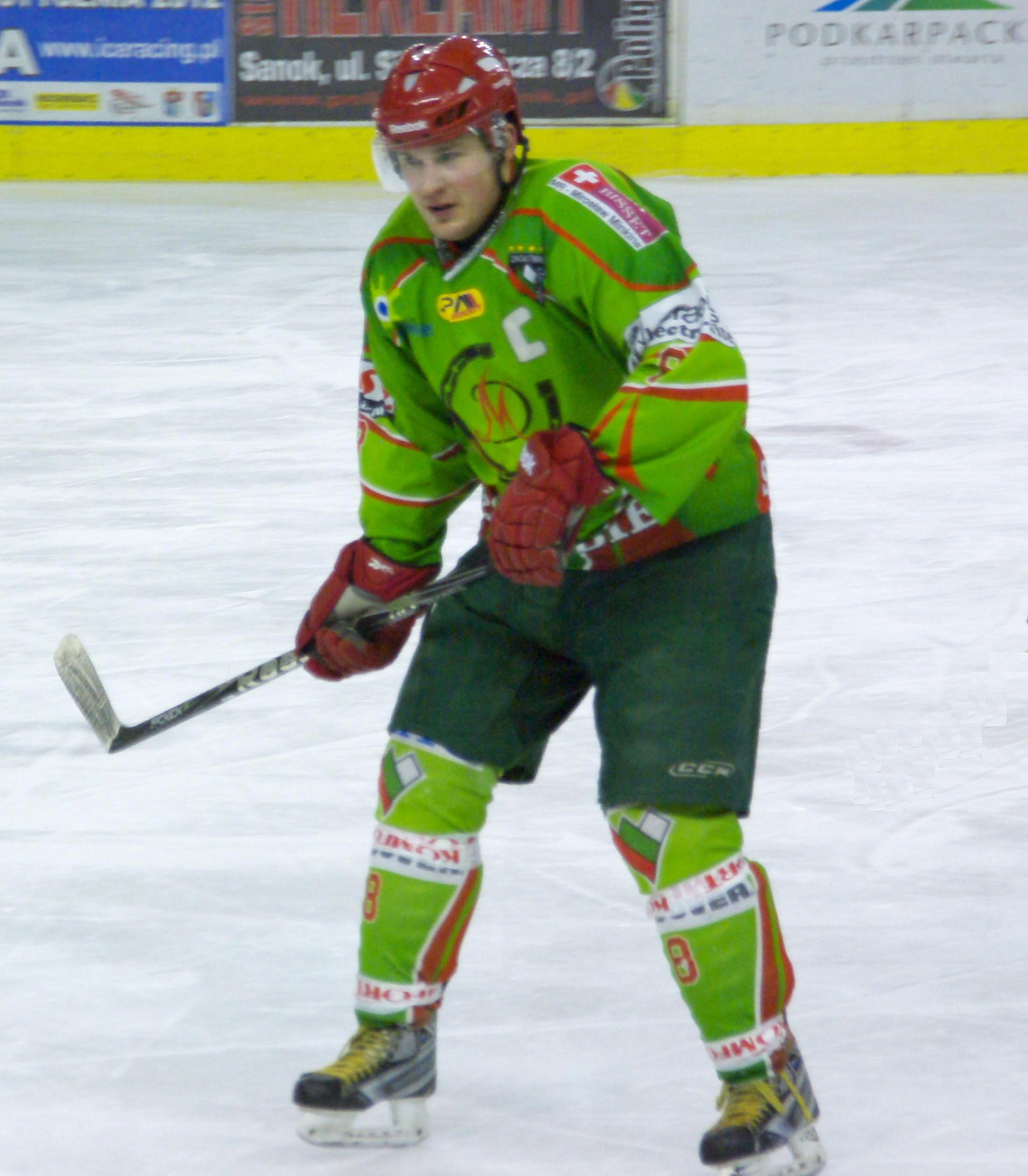 Artur Ślusarczyk w barwach Zagłębia Sosnowiec w meczu z Ciarko PBS Bank Sanok, Arena Sanok 10 lutego 2012